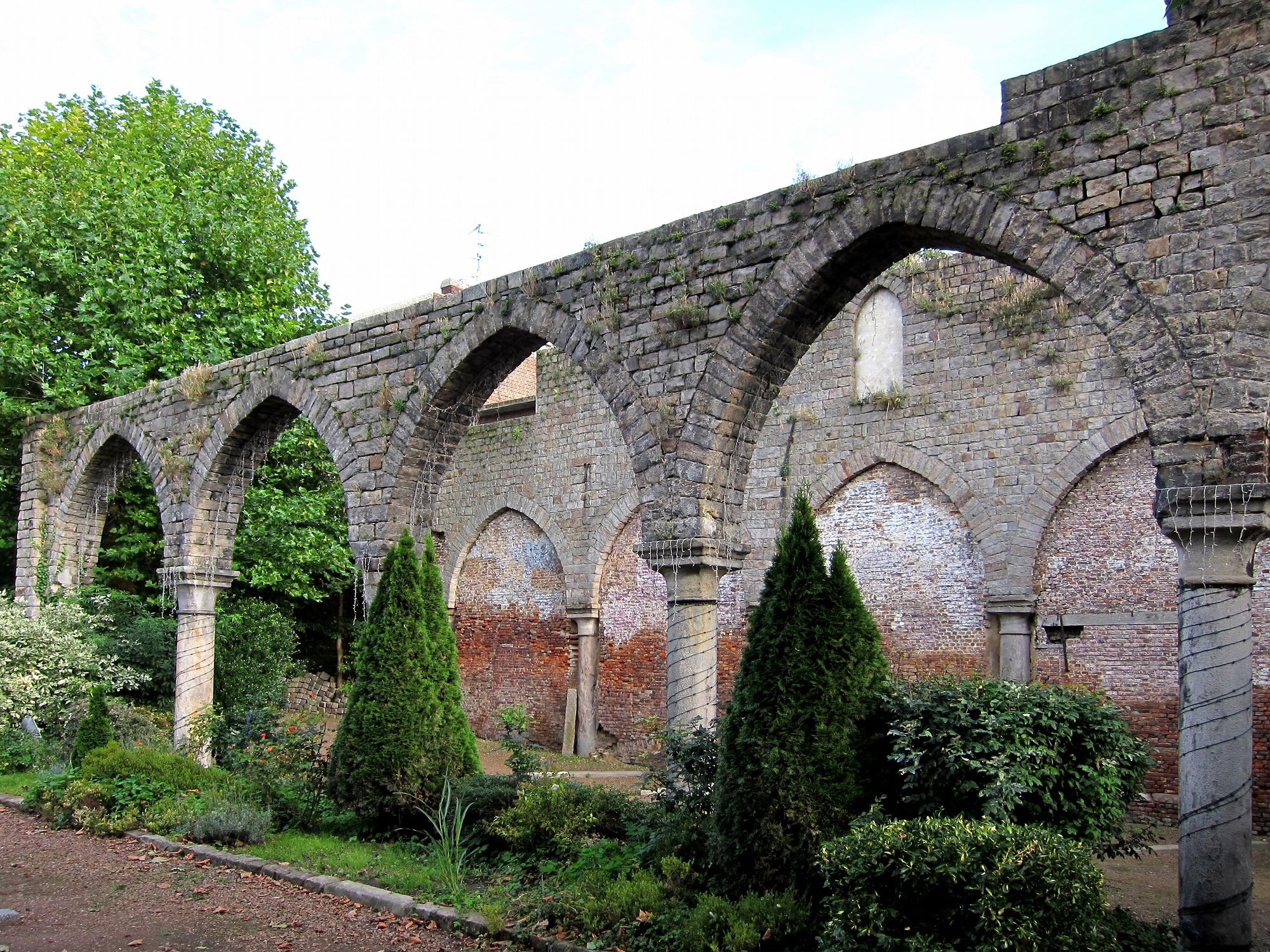 Les ruines de l'église des Récollets à Béthune (Pas-de-Calais).